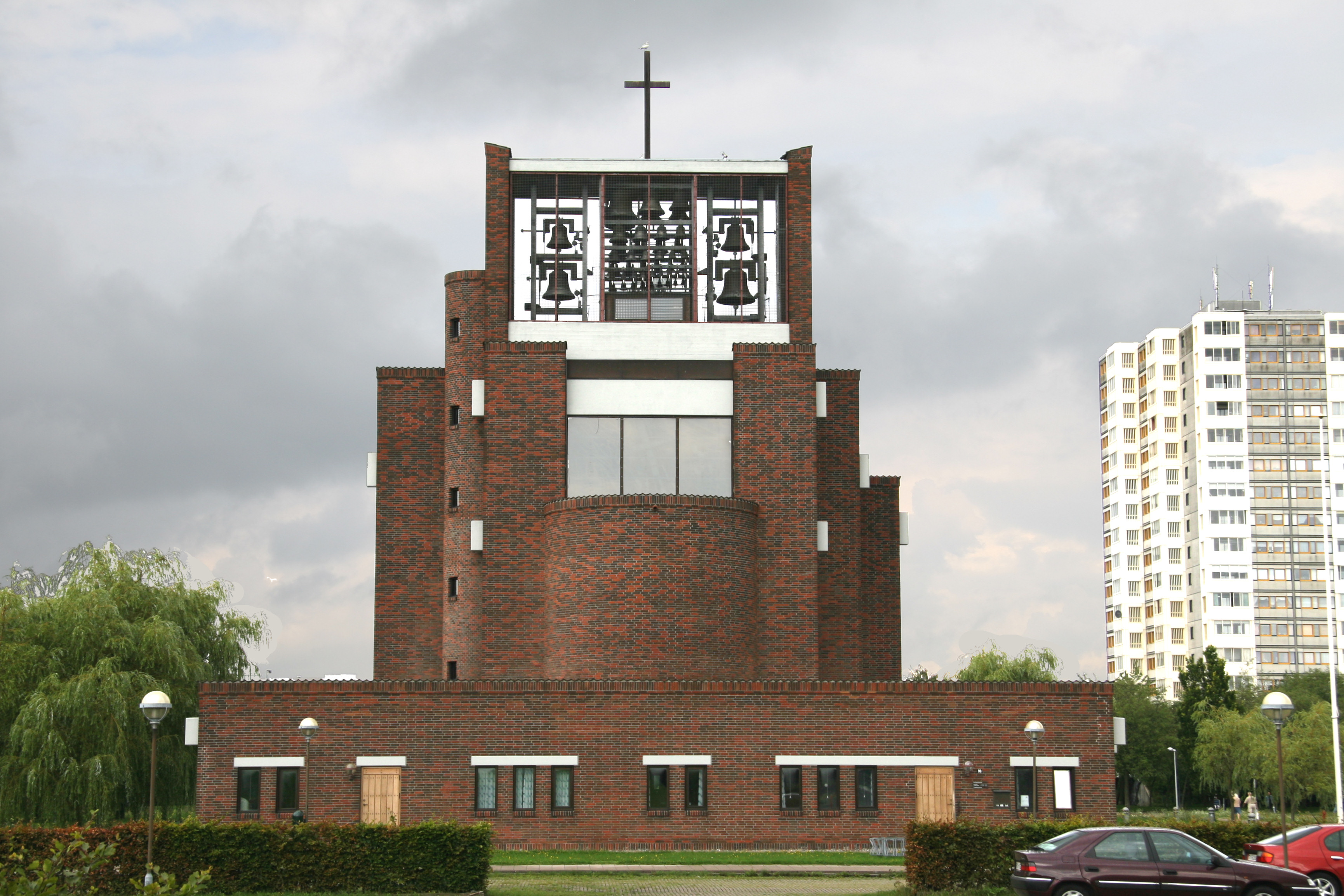 Brøndby Strand Kirke, Copenhagen County, Denmark. Front.